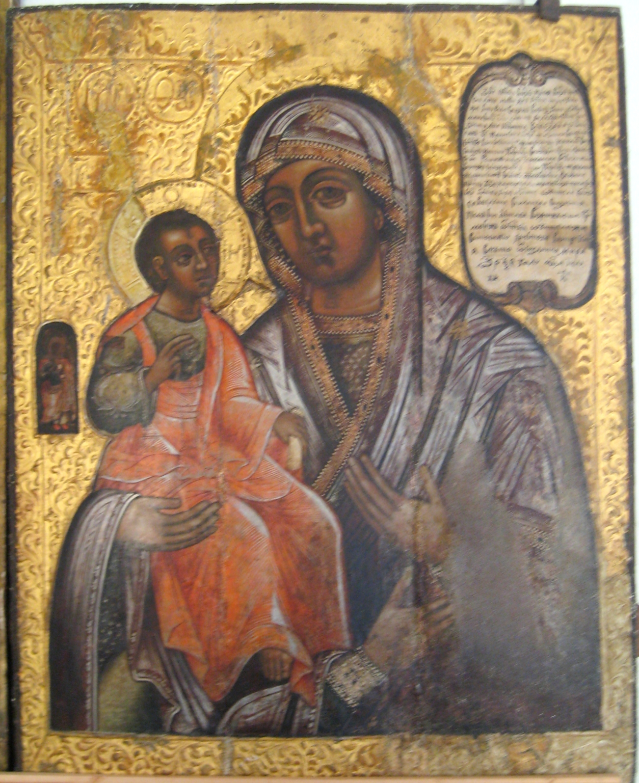 Богоматерь Троеручица. Ферапонтов Монастырь